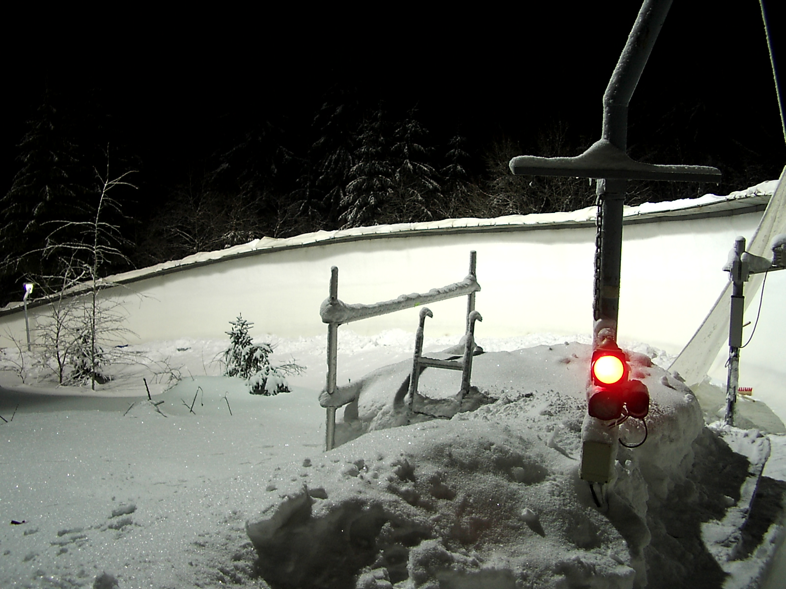 Rennrodelbahn Oberhof - Kurve 2